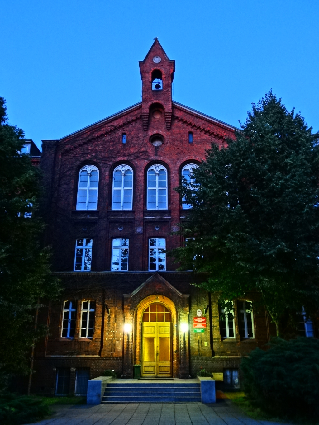 Budynek Bernardyńska 6 Bydgoszcz, Ewangelickie Seminarium Nauczycielskie 1880, ob. Wydział Rolniczy Uniwersytetu Technologiczno-Przyrodniczego